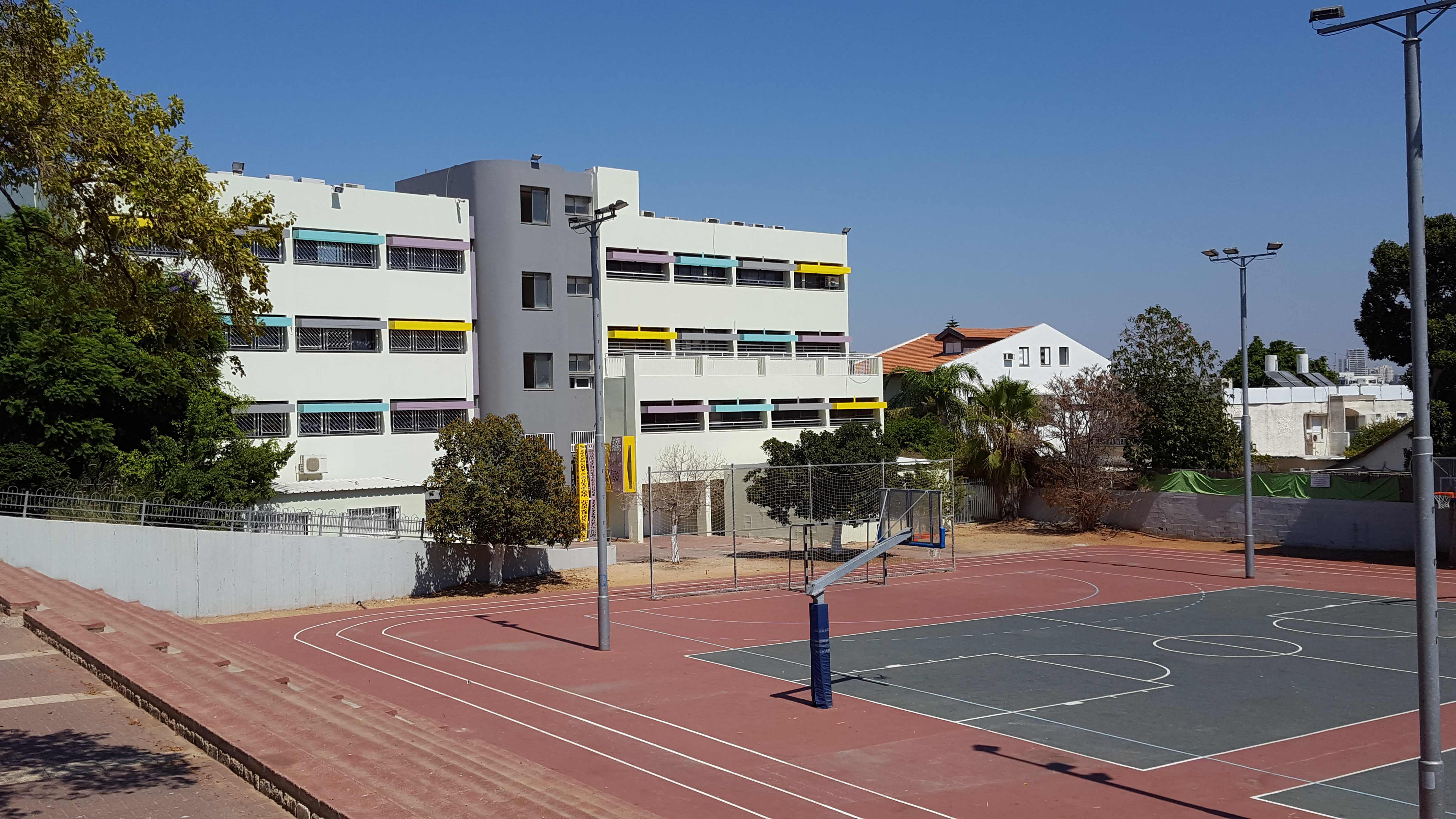 תיכון עירוני בליך ברמת חן, רמת גן, ישראל